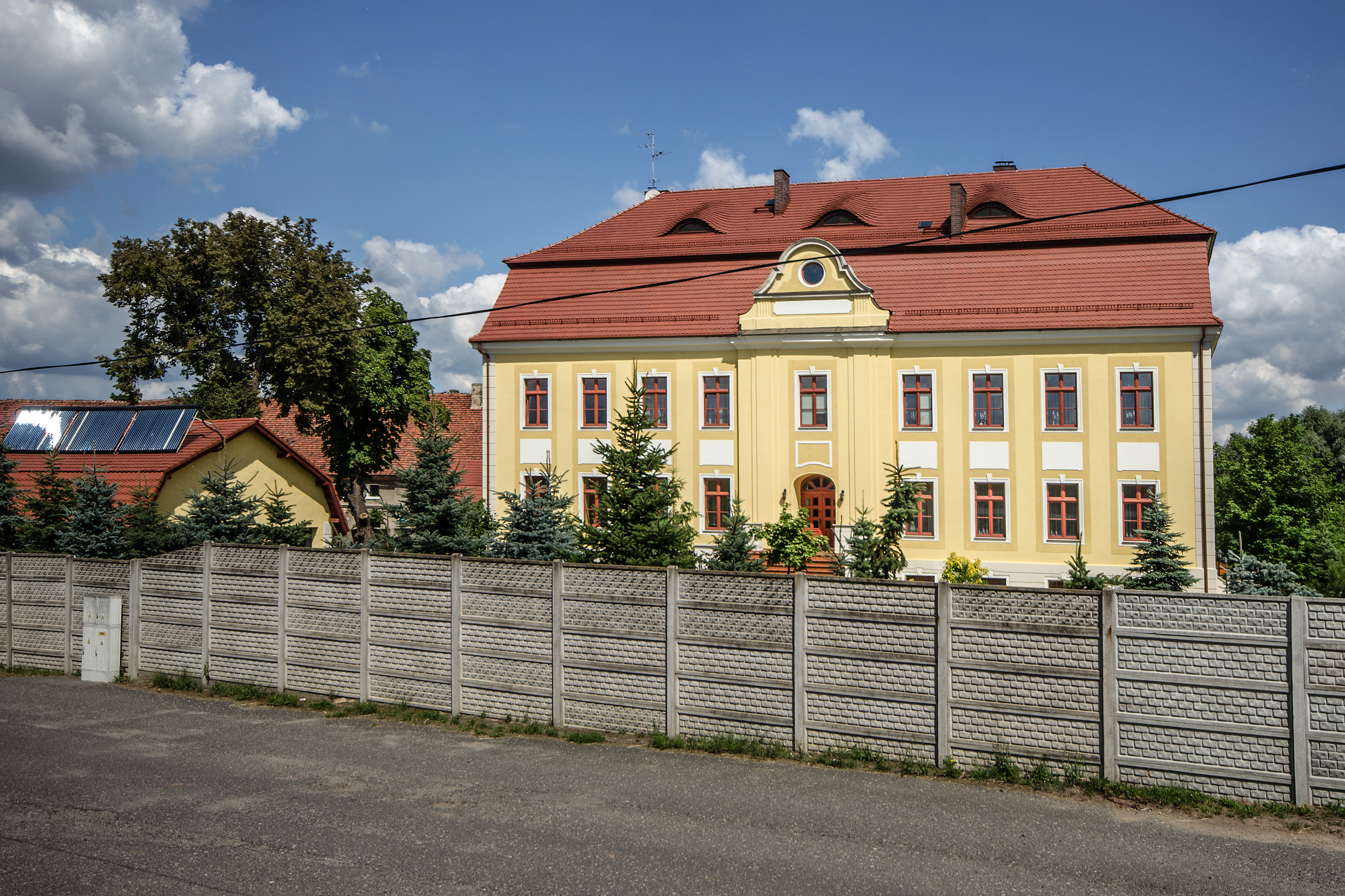 Zwanowice, pałac (nr 58a), XVIII, XIX